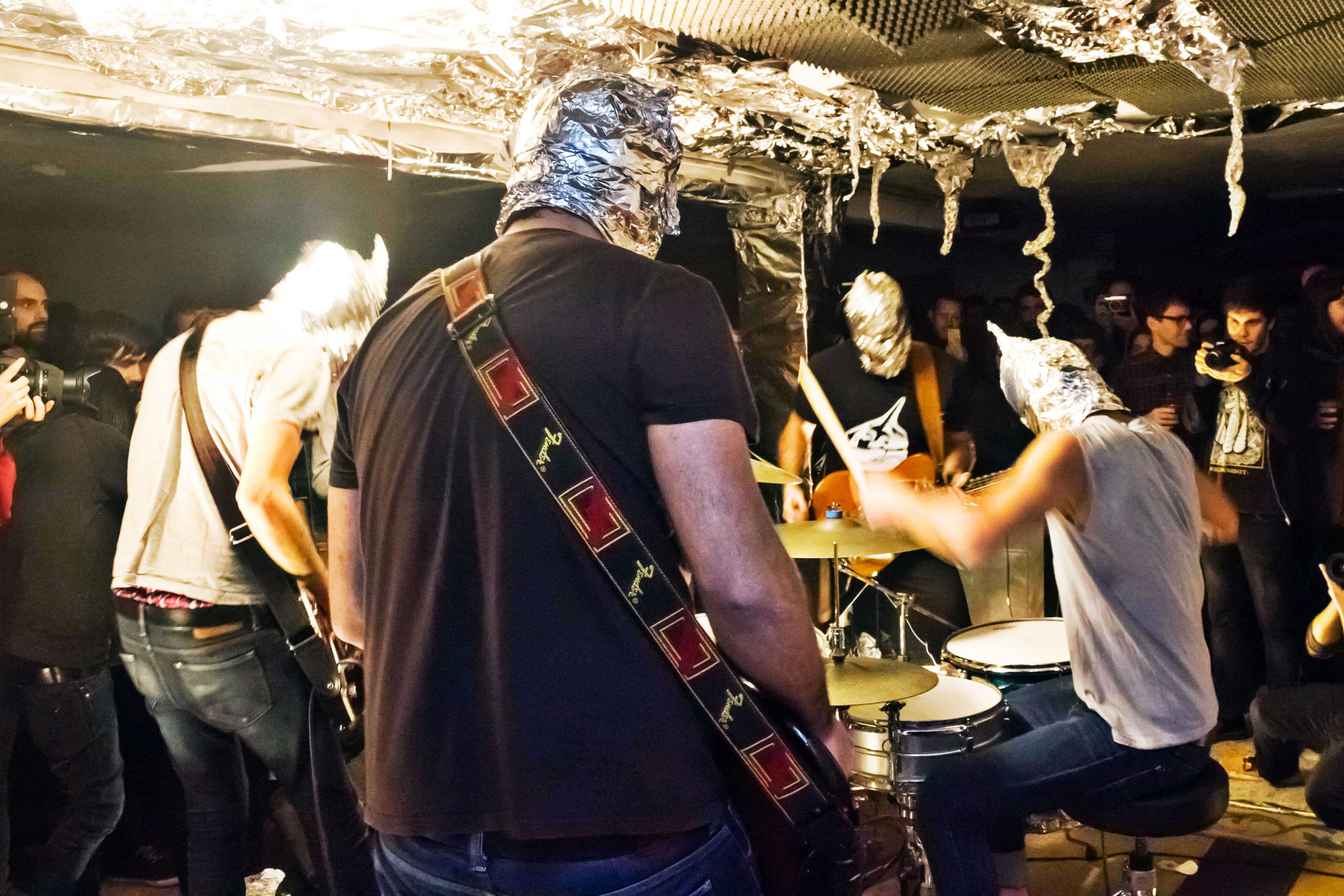 Unicornibot no Liceo Mutante de Pontevedra no que sería o seu derradeiro concerto.